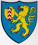 Wappen von Savagnier Kanton Neuenburg Schweiz